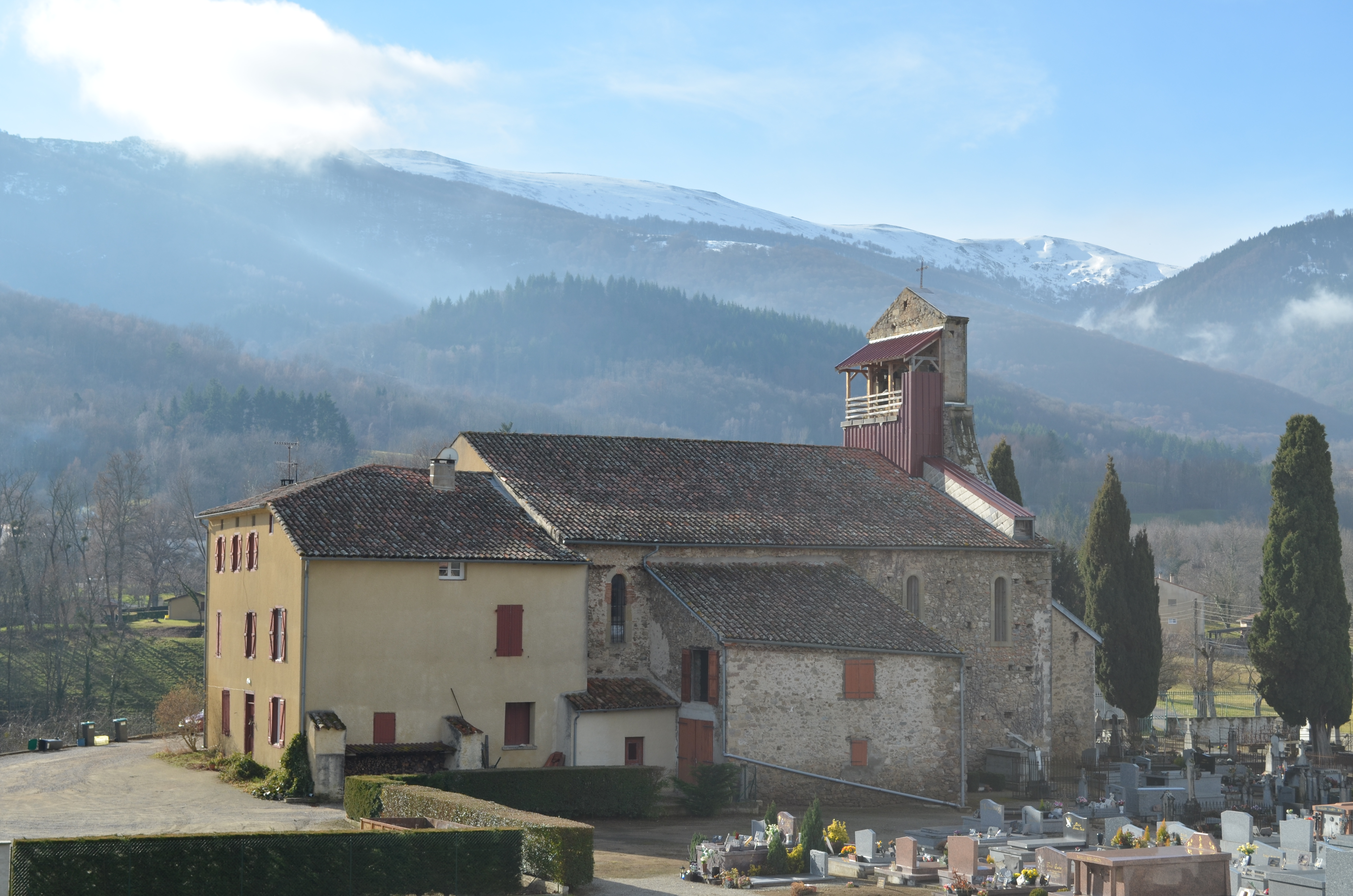 Eglise de Brassac (Ariège)